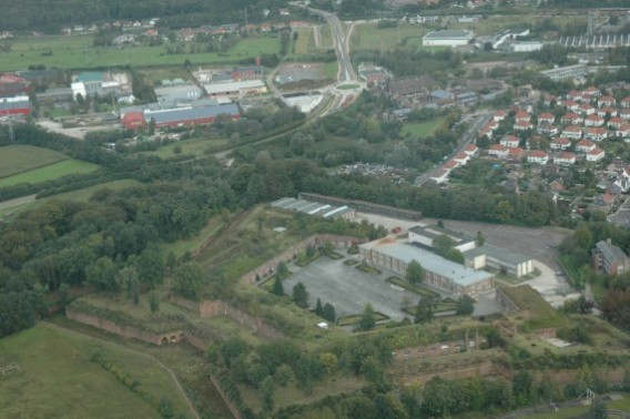 Luchtfoto van de Citadel van Diest